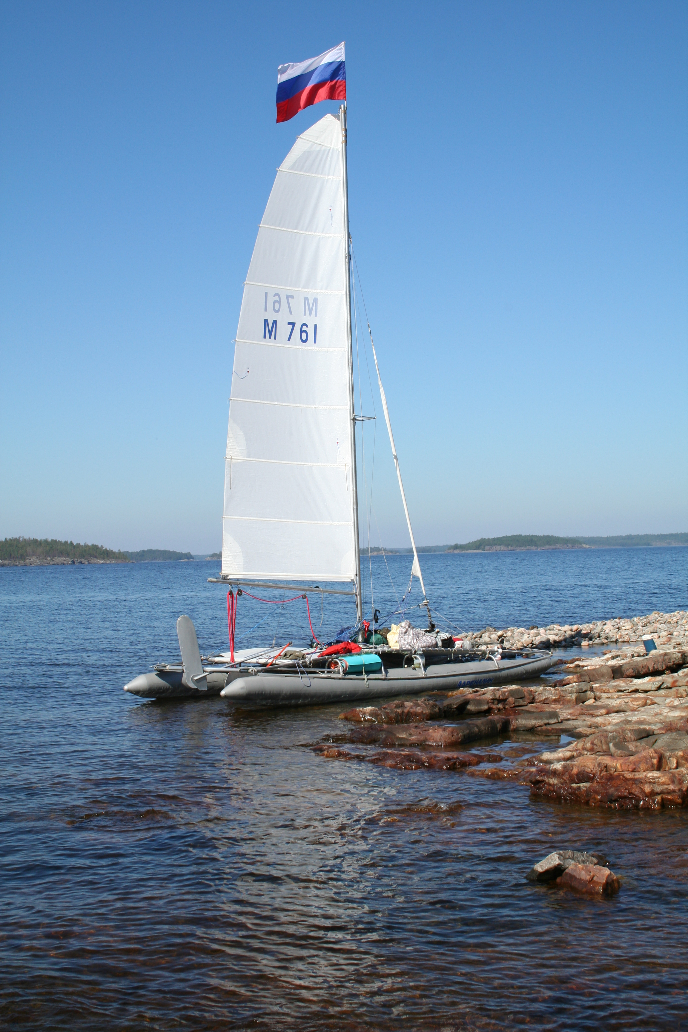 Разборный парусный катамаран